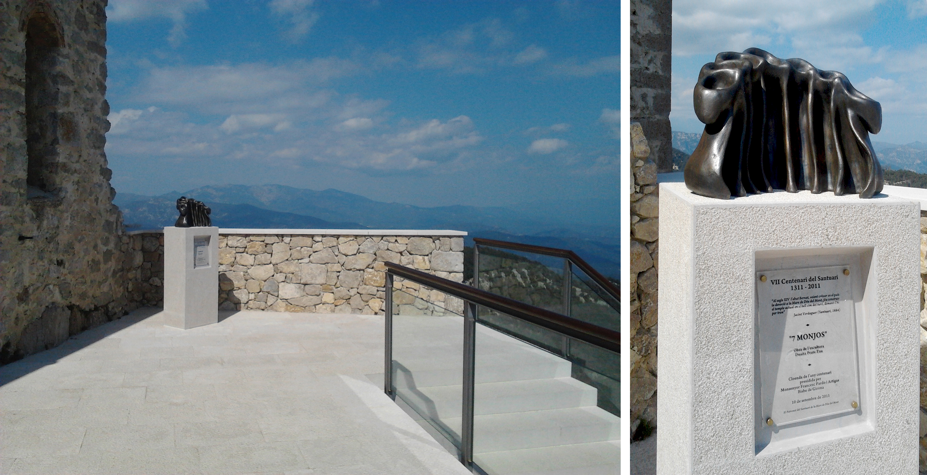 Santuari de la Mare de Déu del Mont, façana de sol ixent. En ella es troba situat el monument commemoratiu al VII centenari, "7 monjos", obra de Duaita Prats.